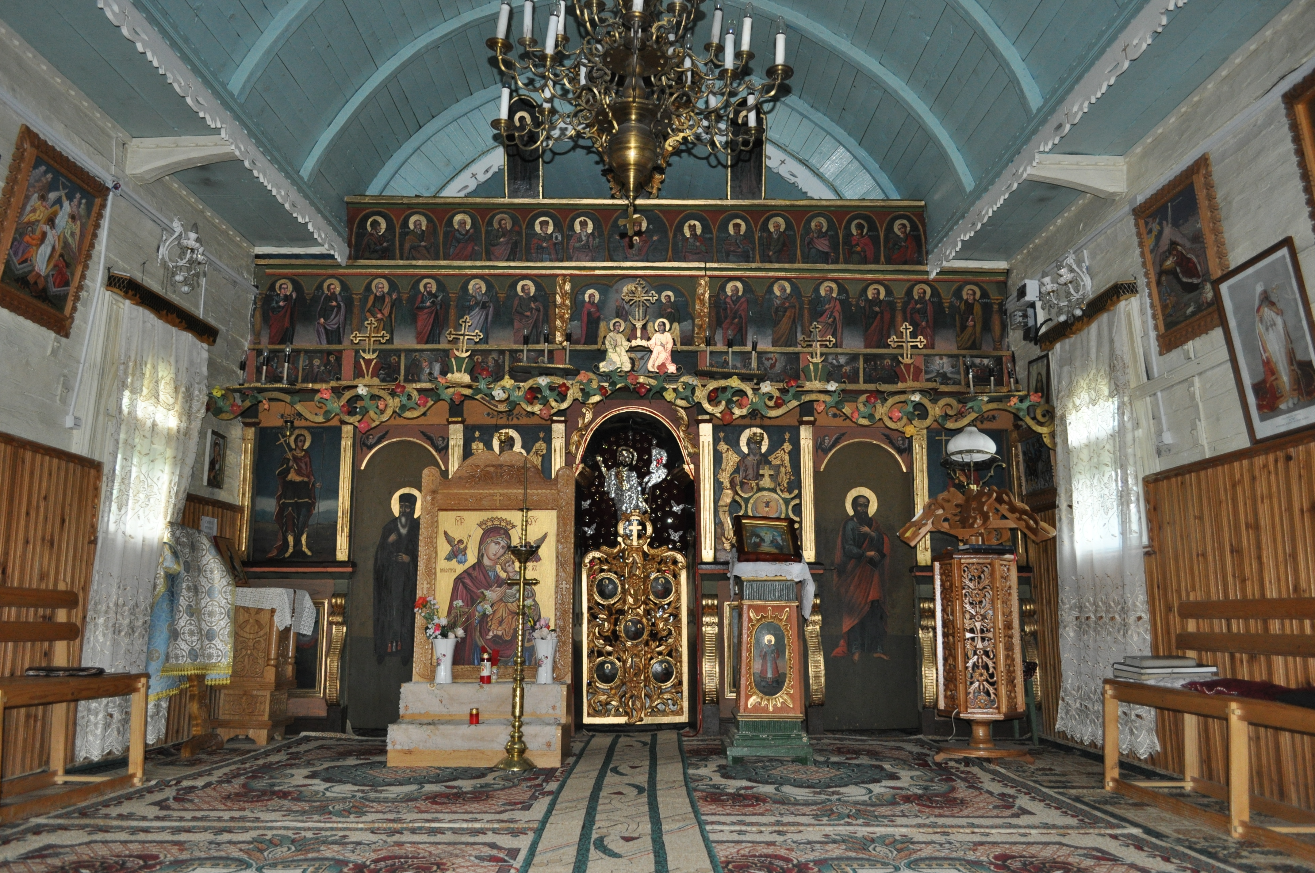 Negoiești, Bacău